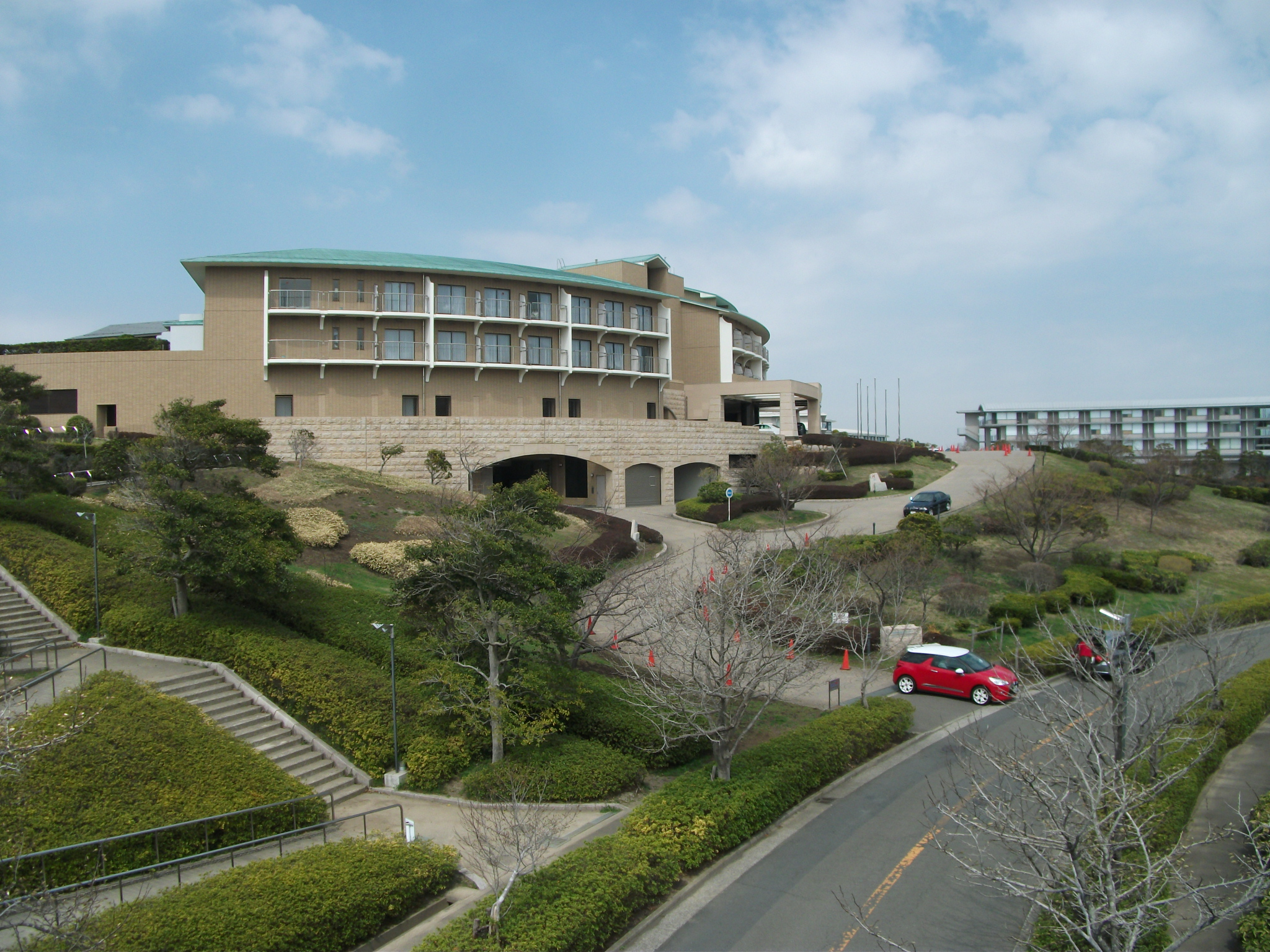 神奈川県葉山町、湘南国際村センター